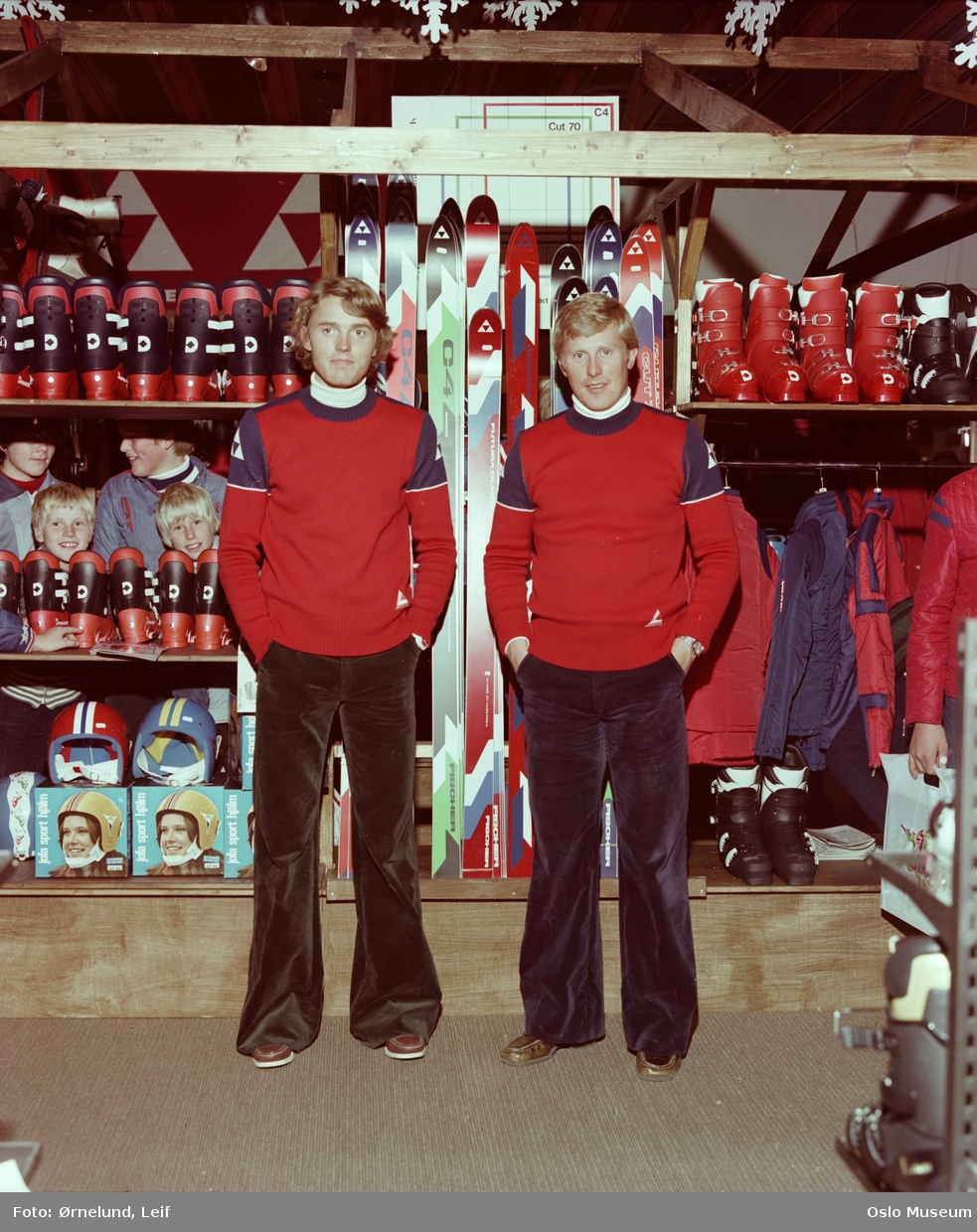 Erik Håker og Odd Sørli.